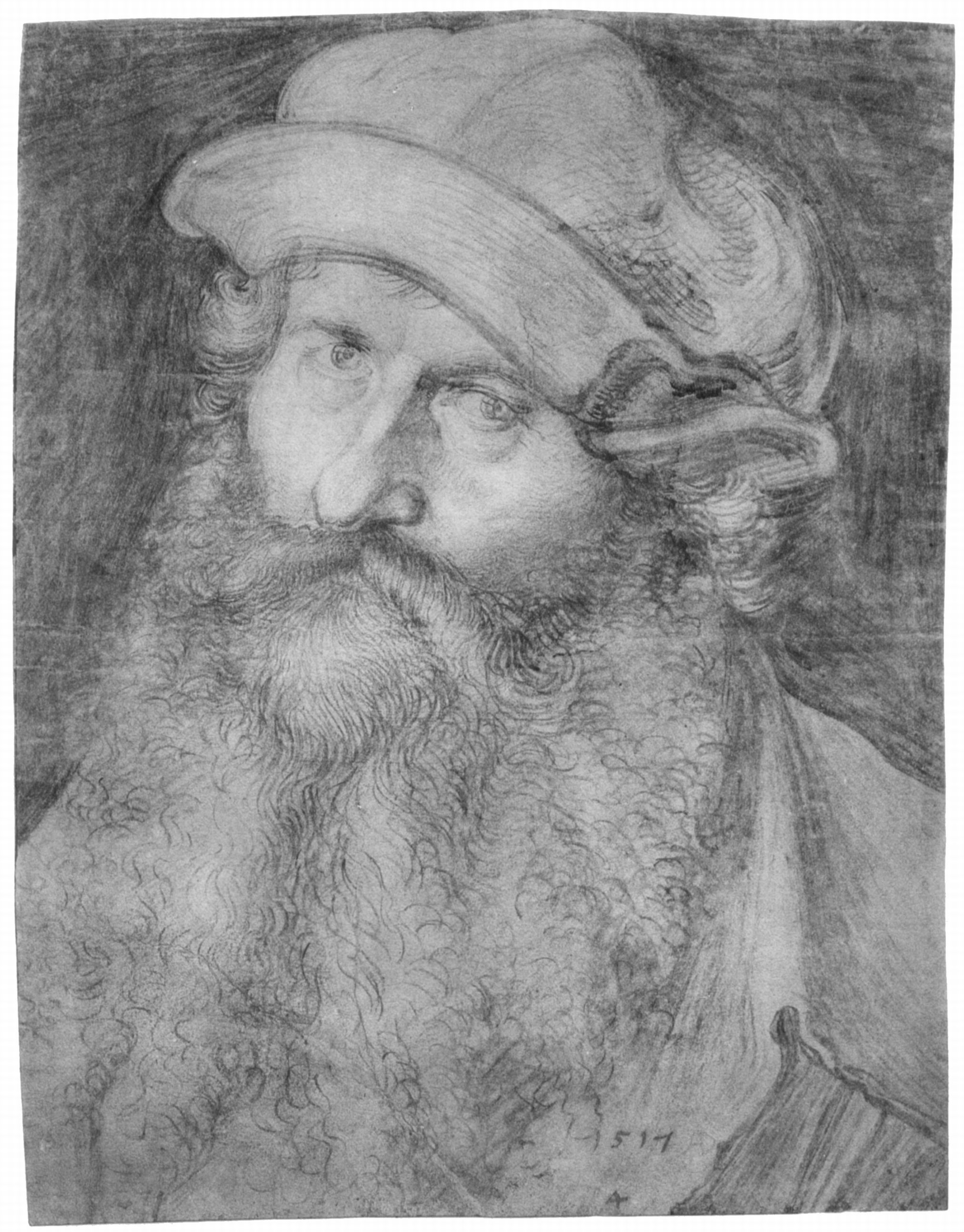 Porträt eines Mannes (Johannes Stabius)